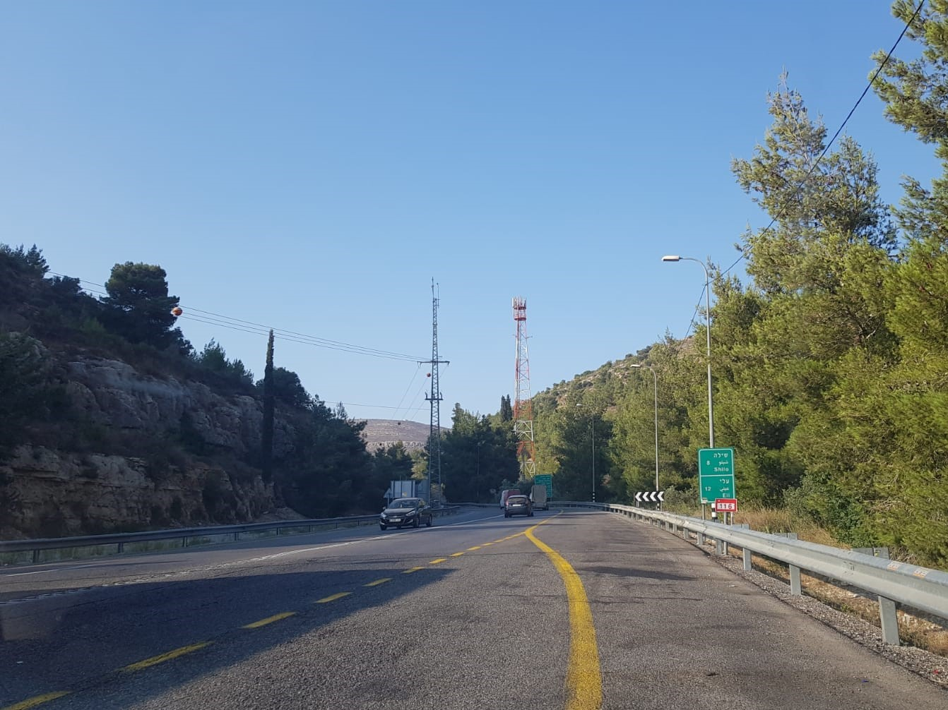 כביש 60 מבט מדרום לצפון